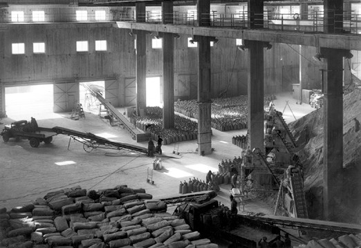 Betongmagasin på Gäddviken blev senare en del av KF:s kafferosteri